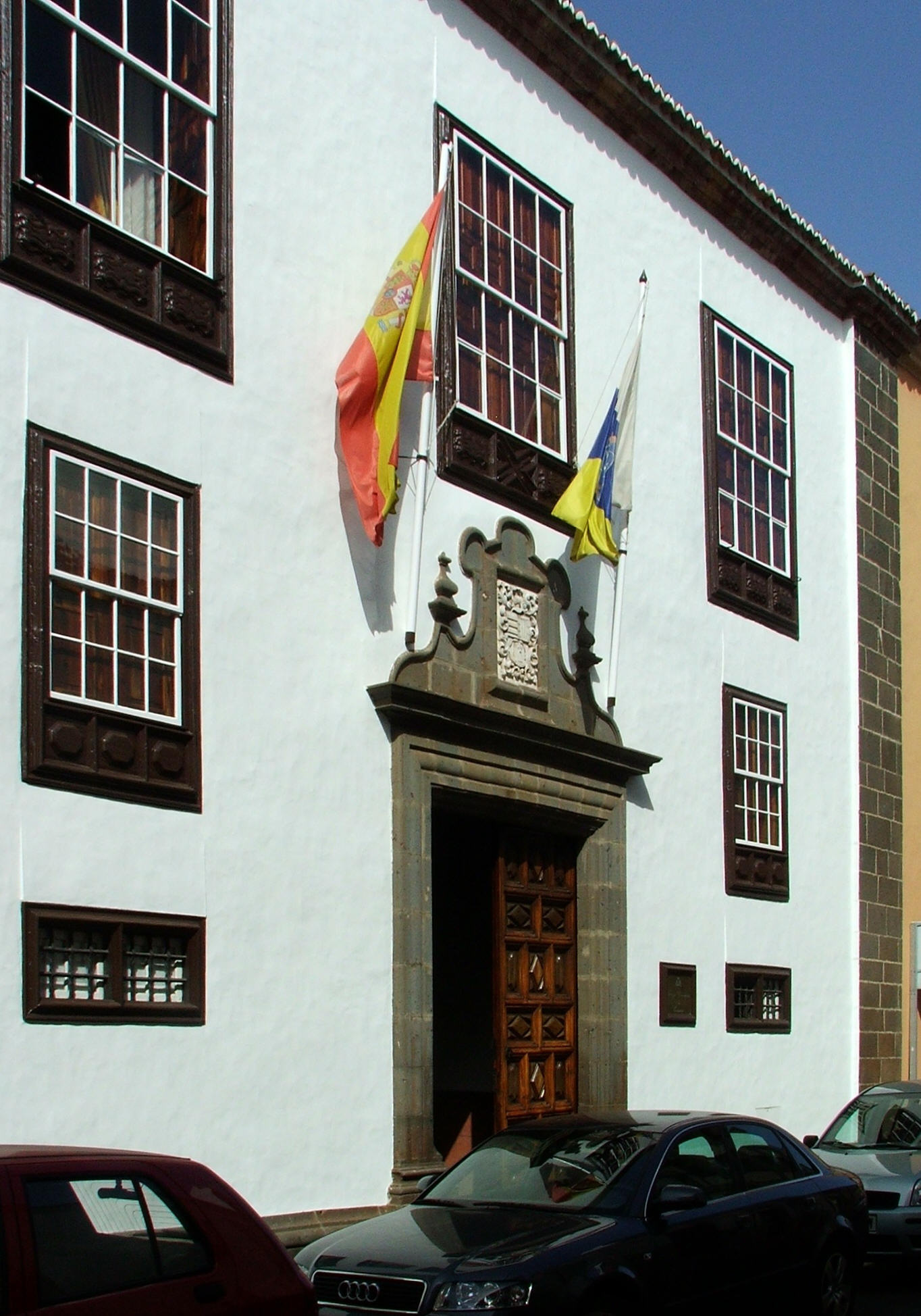 Casa Montañéz, La Laguna